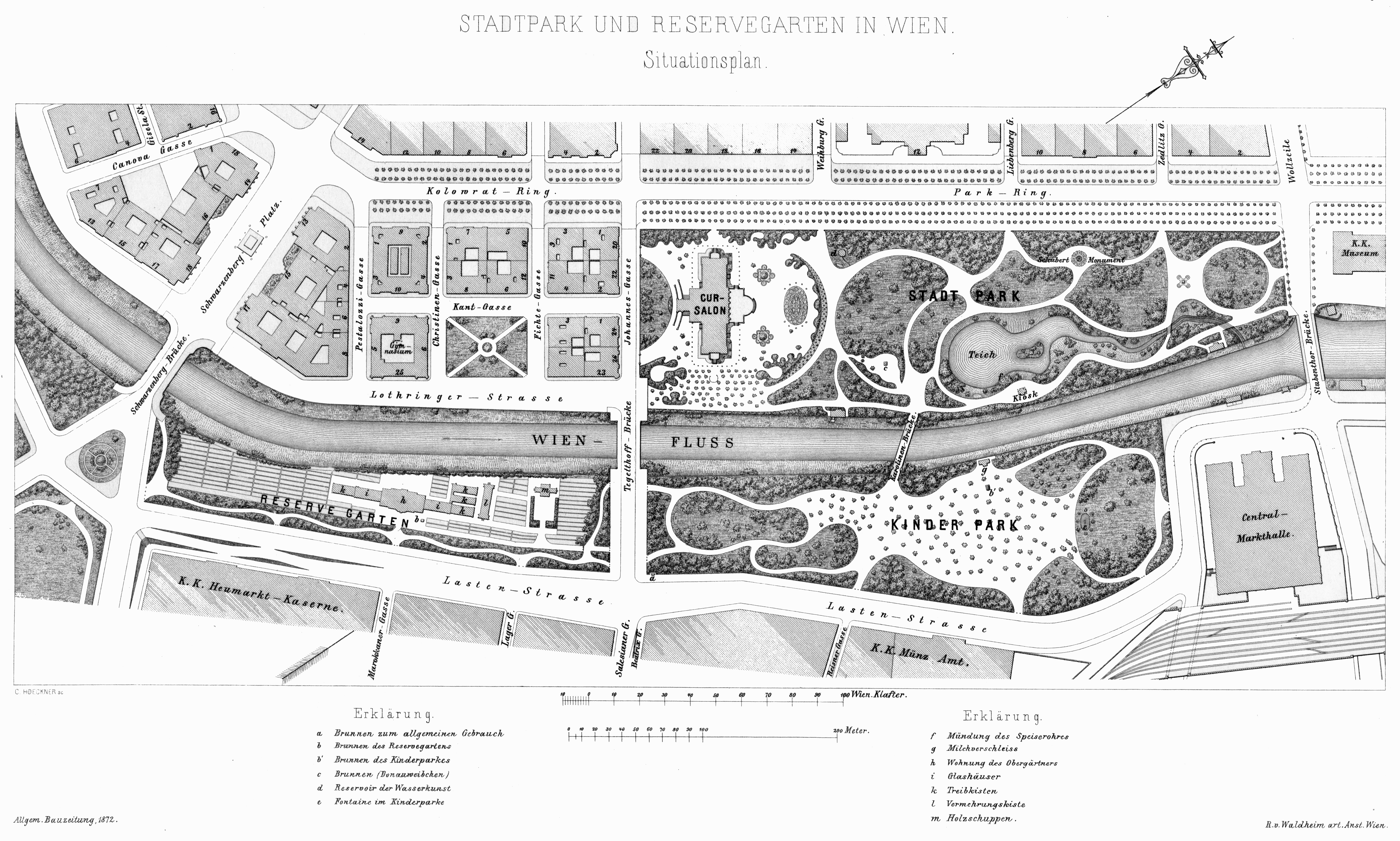 Wien, Innere Stadt, Stadtpark und Reservegarten, Lageplan